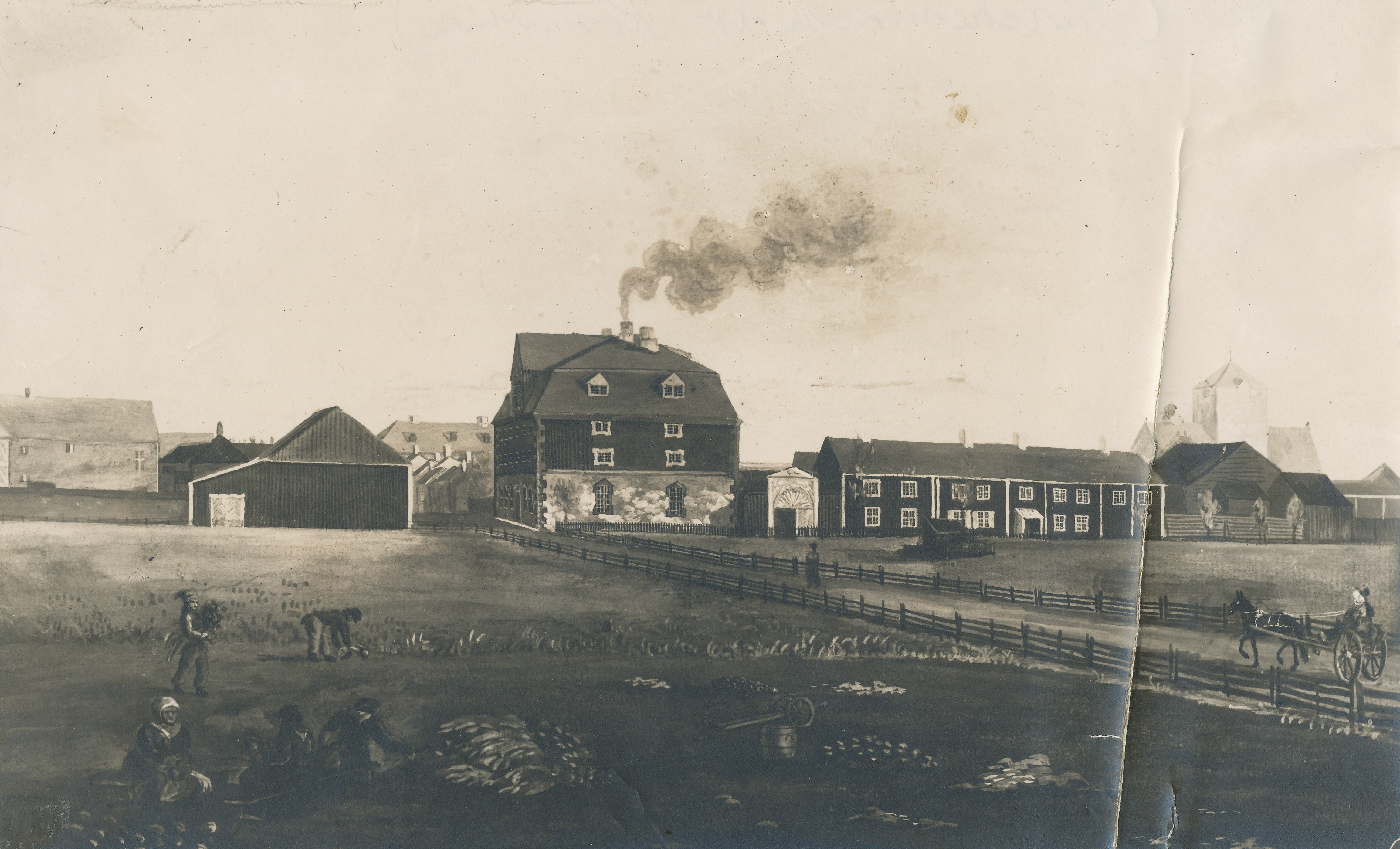 Gouache av Johannes Finne Rosenvinge (1804 - 1827), 1820 Sukkerraffineriet fra 1754 på Leütenhaven er Norges eldste bevarte fabrikkbygning og stedet hvor E. C. Dahls bryggeri startet opp i 1856. The sugar refinery from 1754 located at Leütenhaven in Trondheim is Norway's oldest preserved factory building, as well as the place where E. C. Dahls breweries started their production in 1856. Huset ble bygget i 1754 av Trondhjems Sukkerraffinaderi. Stiftamtmannen i Trondhjem, von Rantzow, sendte etter pålegg følgende beskrivelse av anlegget til Kommersekollegiet i København: "Angaaende Sukkerraffinaderi-huset og de til Sukkerraffinaderiet hørende redskaper. Dette hus befandtes 112 Fod langt, 56 Fod bredt og 60 Fod høit. Den underste Etage af Grundmur, 8 1/2 Alen høi samt 2 Alen tyk, og de øverste Etager af Tømmer, med et stort italiensk Tag paa af Bor dog tækket med blaa glasserede Sten, alle fast spigrede og tildels i Kalk nedlagt. Paa Taget er i de udbyggede Gavler 12 Vinduer, i Træbygningen 43 og i Murbygningen 14 Vinduer. I Huset paa den høire Side af Indgangen fra Gaden og Nord, er 4 Etager og paa den venstre Side 5 Etager. I underste Etage paa den høire Side er 3 Værelser mod Syd, opmurede i en Linie, de 2 for Sukker og Sukkerkandis at tørre med 2 tilstøbte Jernkakkelovne i, og det 3die til at fylde det kogte Sukker i Formene."